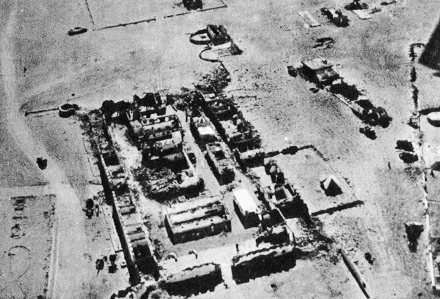 Veduta aerea della Ridotta Capuzzo